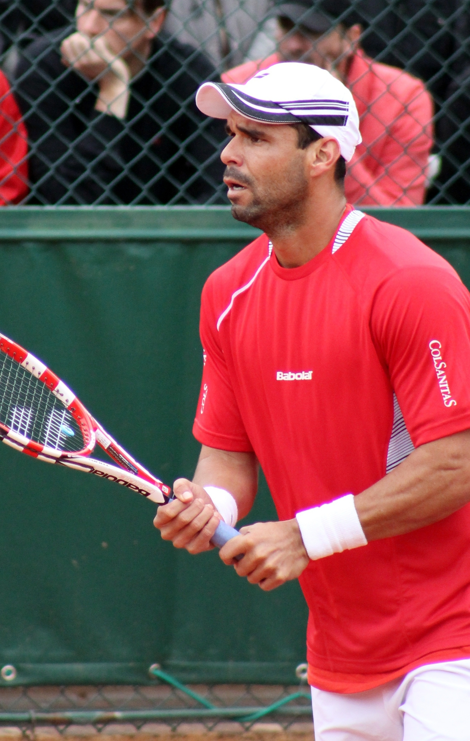 Falla RG13 (10)